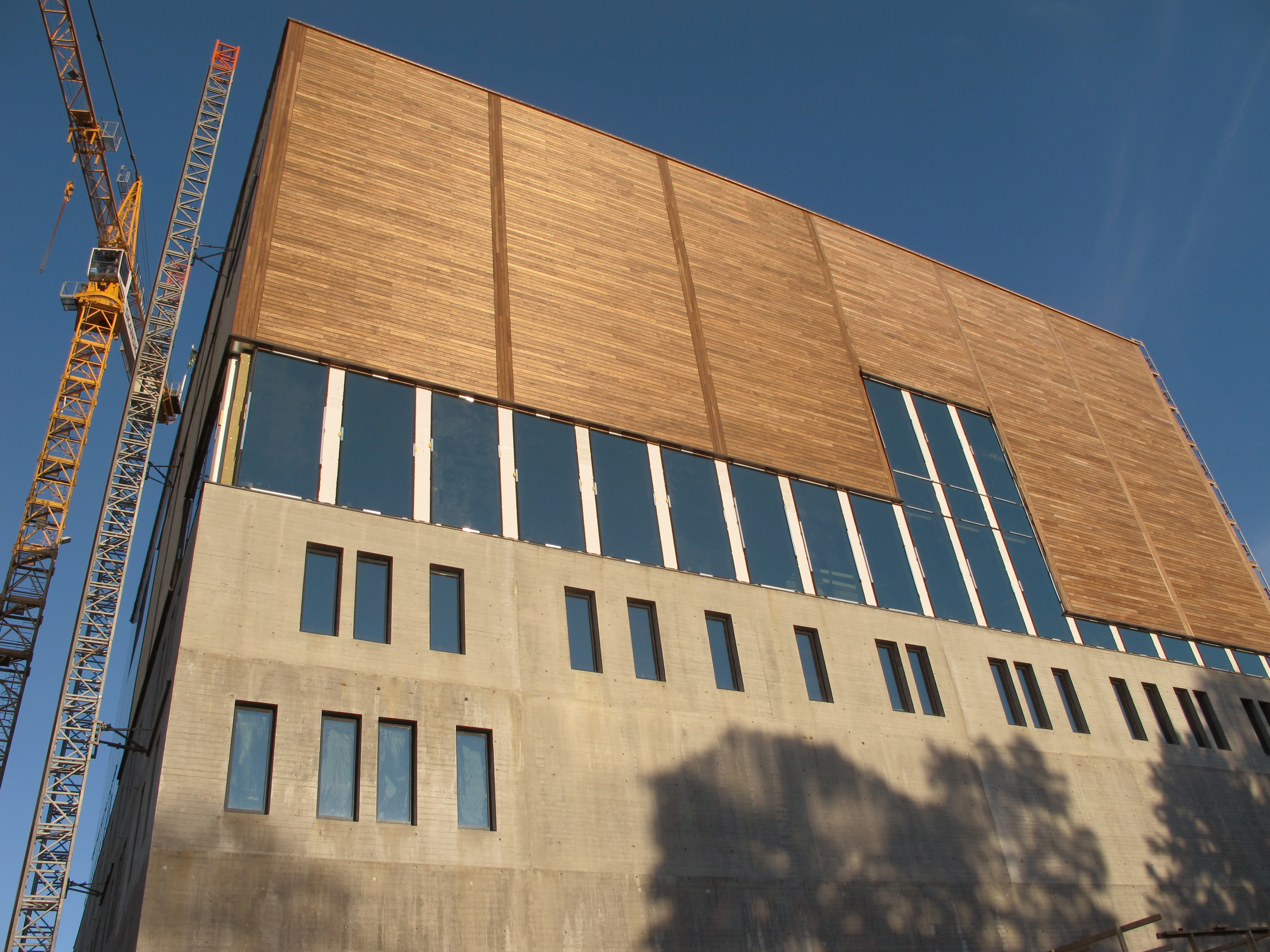 Aust-Agder kulturhistoriske senter, museum og arkiv, nybygg åpnes 2014